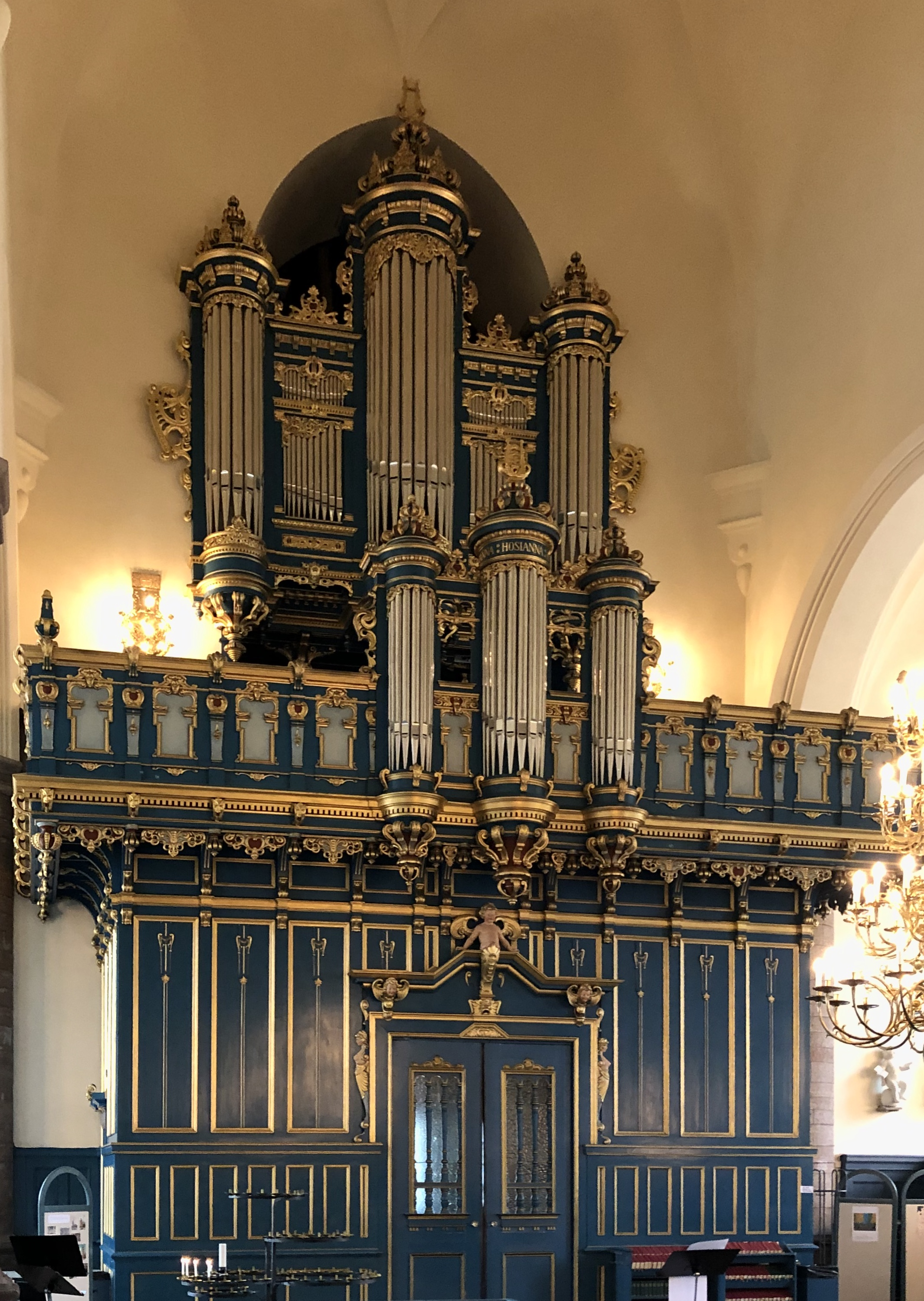 Falu Kristine kyrka läktarorgel Setterqvist 1906